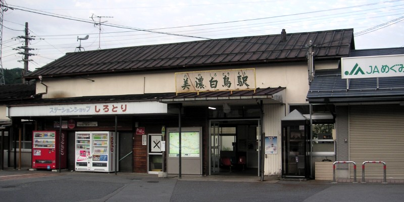 美濃白鳥駅